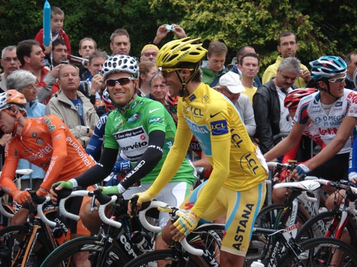 Alberto Contador y Thor Hushovd en la salida de la 17ª etapa del Tour de Francia 2010, entre Pau y el Col du Tourmalet.